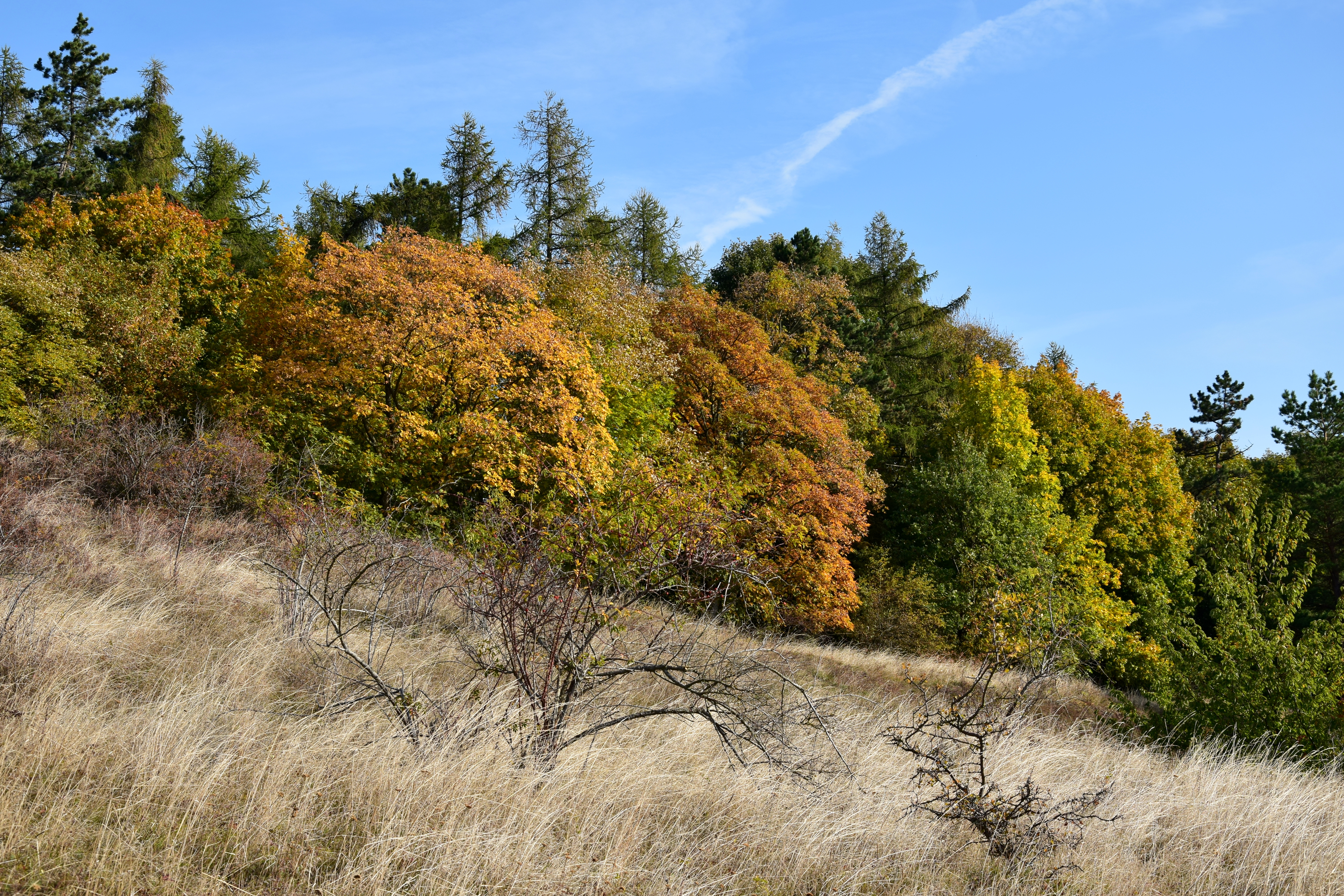 Jezerský vrch – úbočí nad bývalým lomem